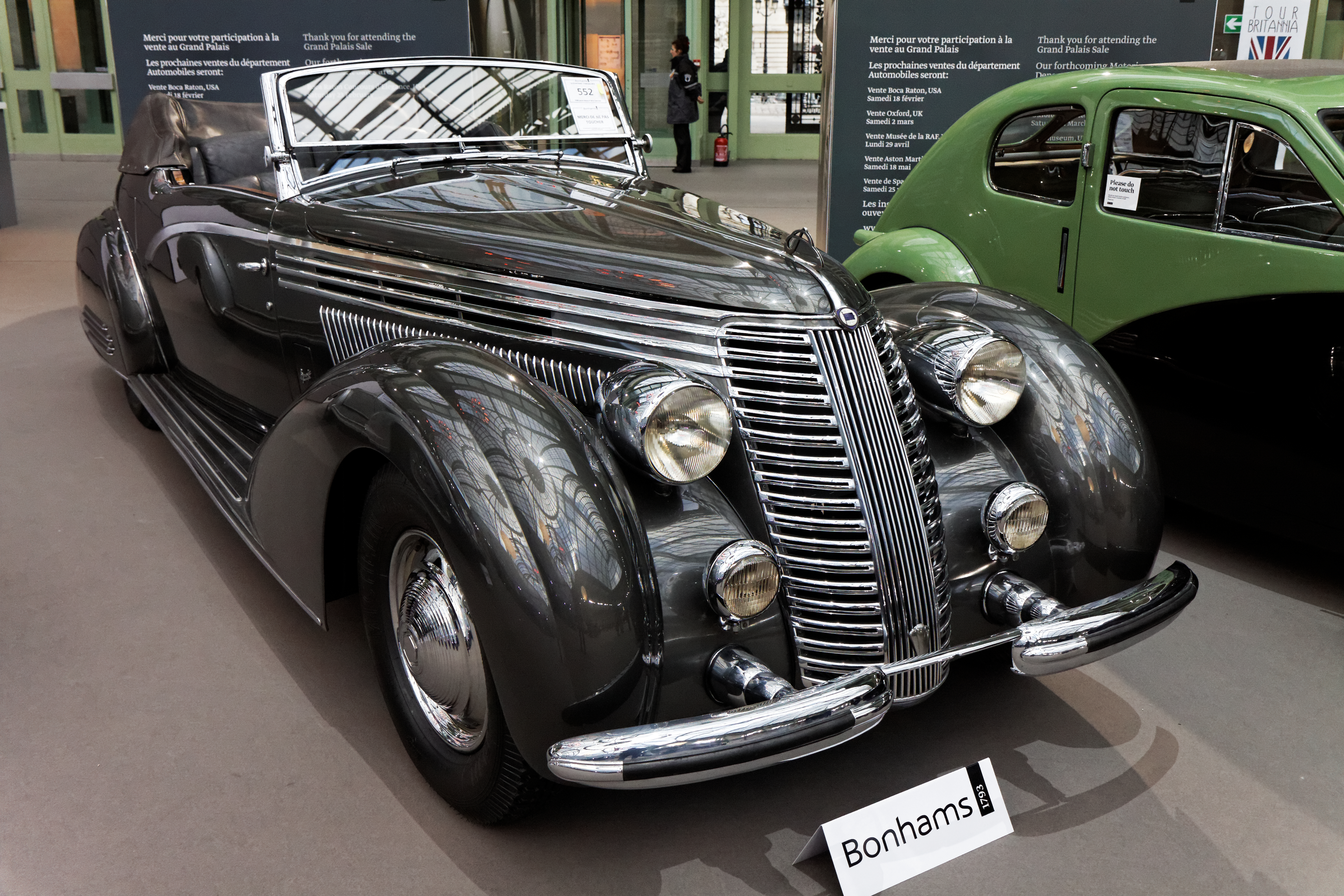 Une Lancia Astura 4e série cabriolet de 1938.